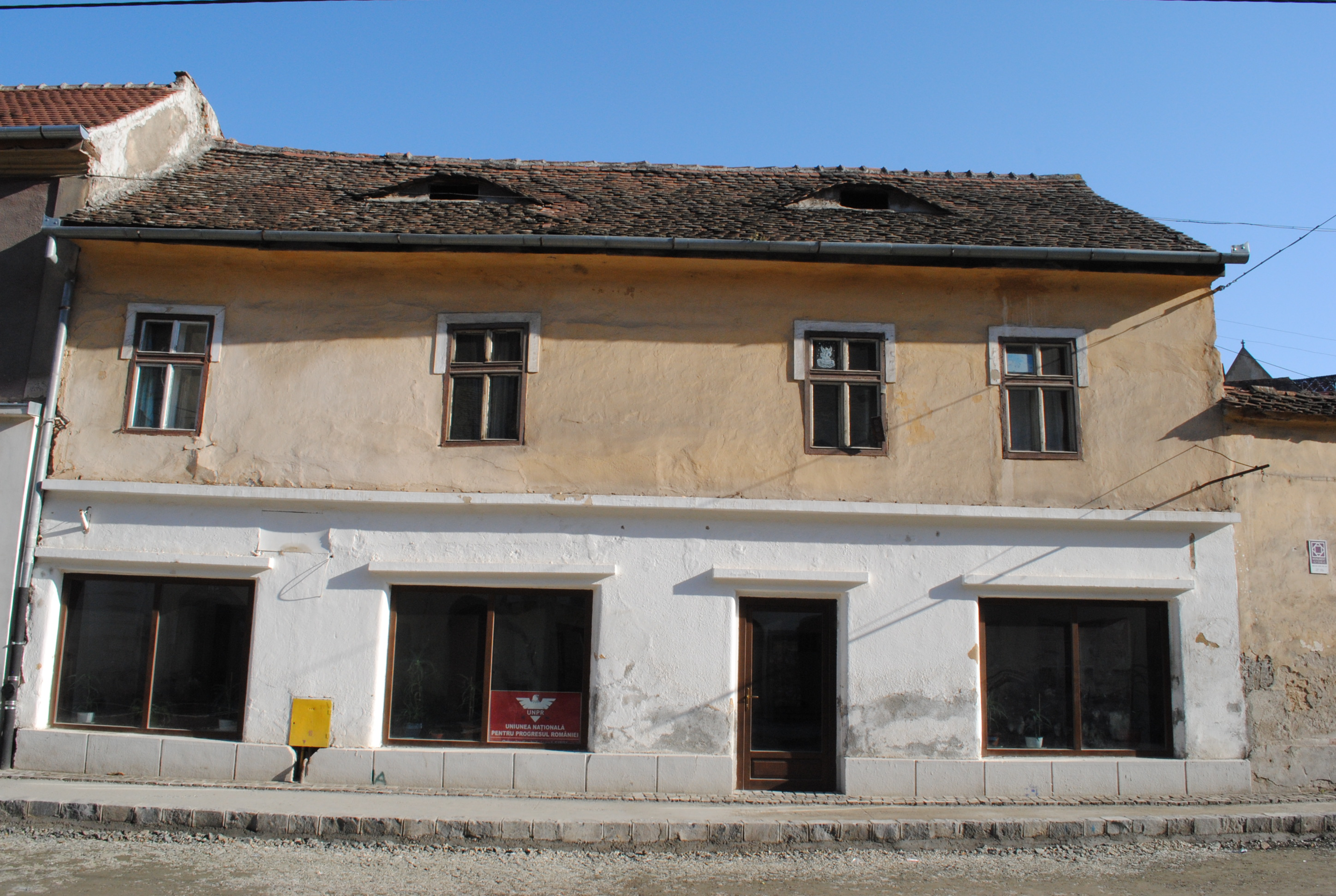 Casă, prima jum. sec. XV, sec. XVIII; mijl. sec. XIX; al doilea sfert al sec. XX